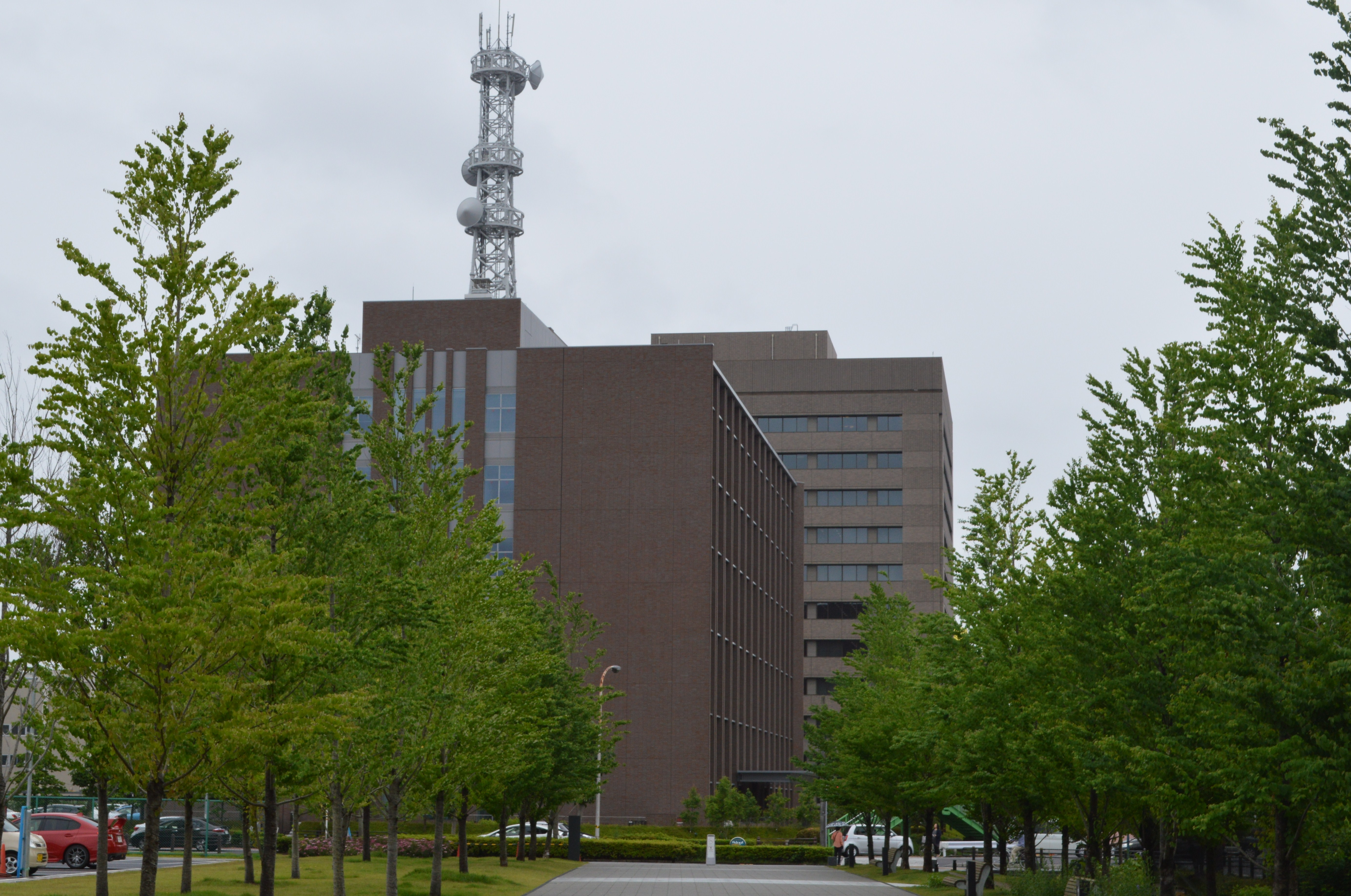 2013年に建設された岐阜地方裁判所・岐阜家庭裁判所（左手前の濃い茶色）、中部電力岐阜営業所（中央奥の薄い茶色）